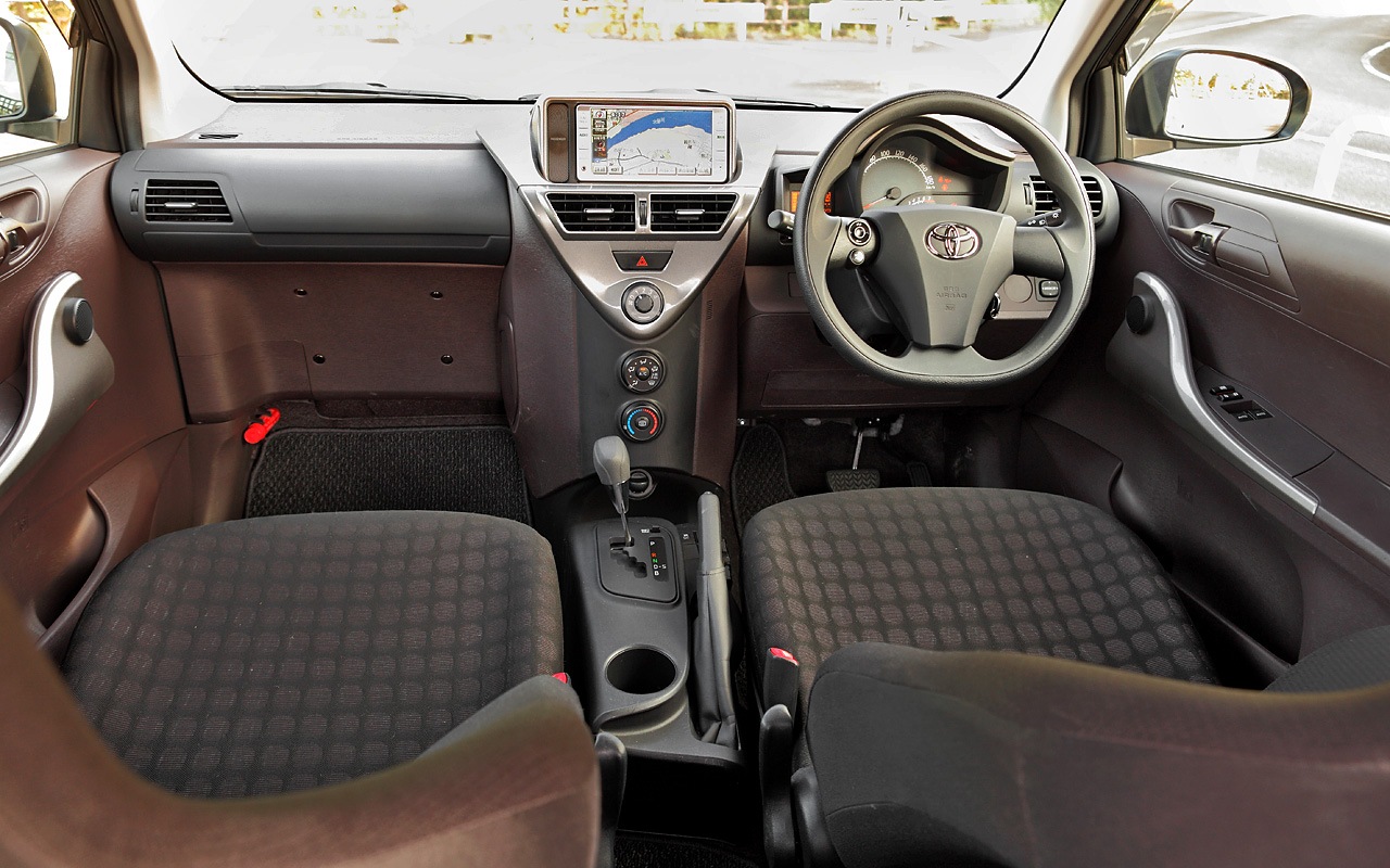 Toyota iQ.